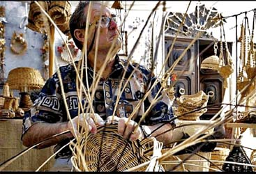 Giovan Giuseppe Buono, viminaio al lavoro nel centro storico di Sorano (GR)